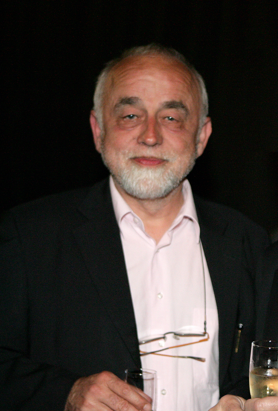 Jan Peumans (Vlaams Parlement)